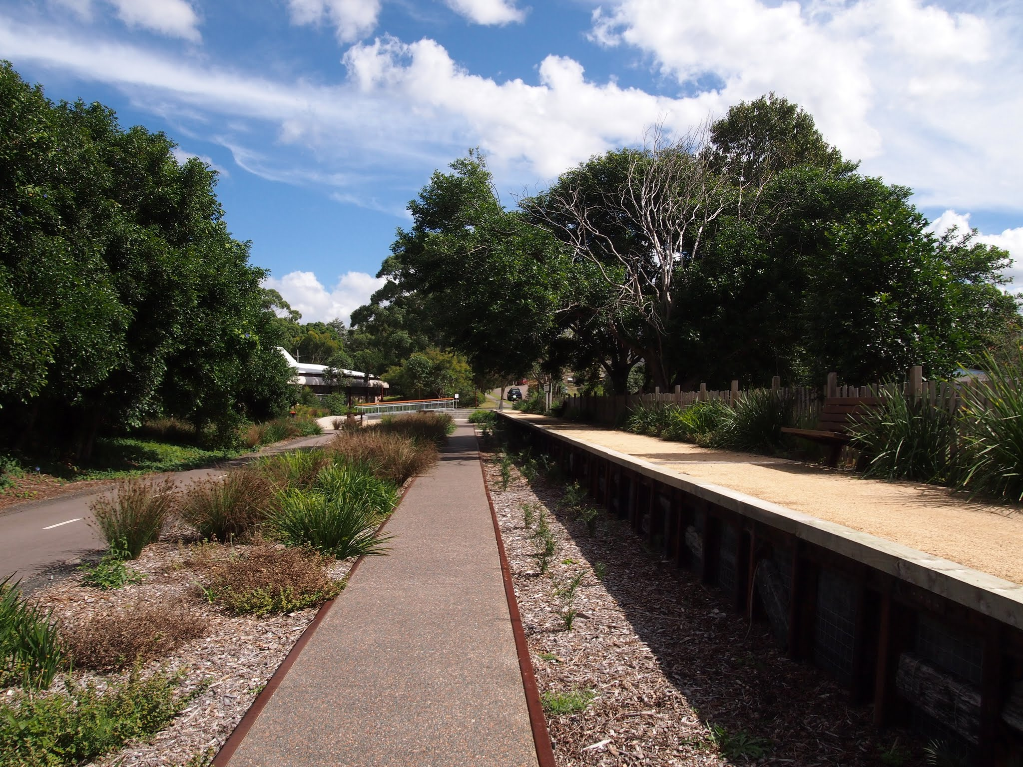 Belmont